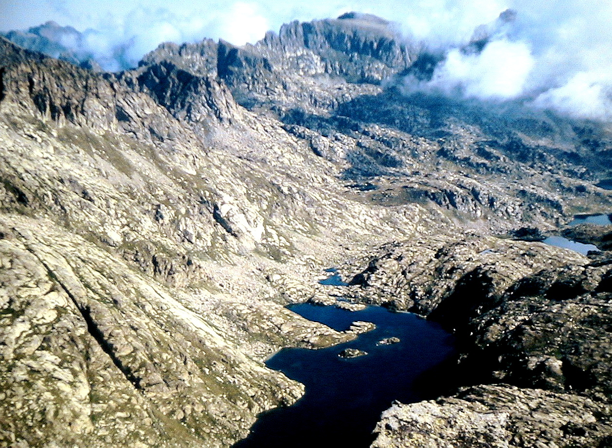 Vall de Peguera: Coma de l'Estany de Cap de Port, amb l'estany, en primer terme, i el Pic de Fonguero al fons. Des del Pic de la Mainera. Any 1986. Foto presa de la projecció d'una diapositiva